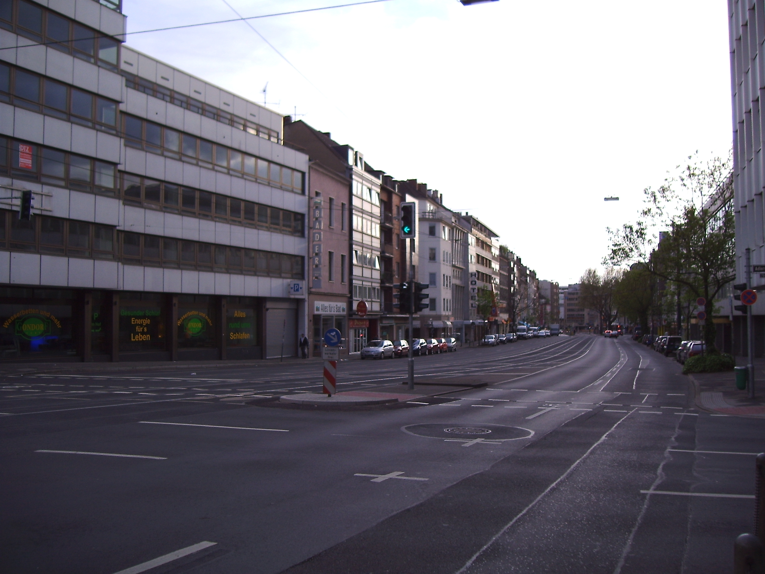 am Wehrhahn